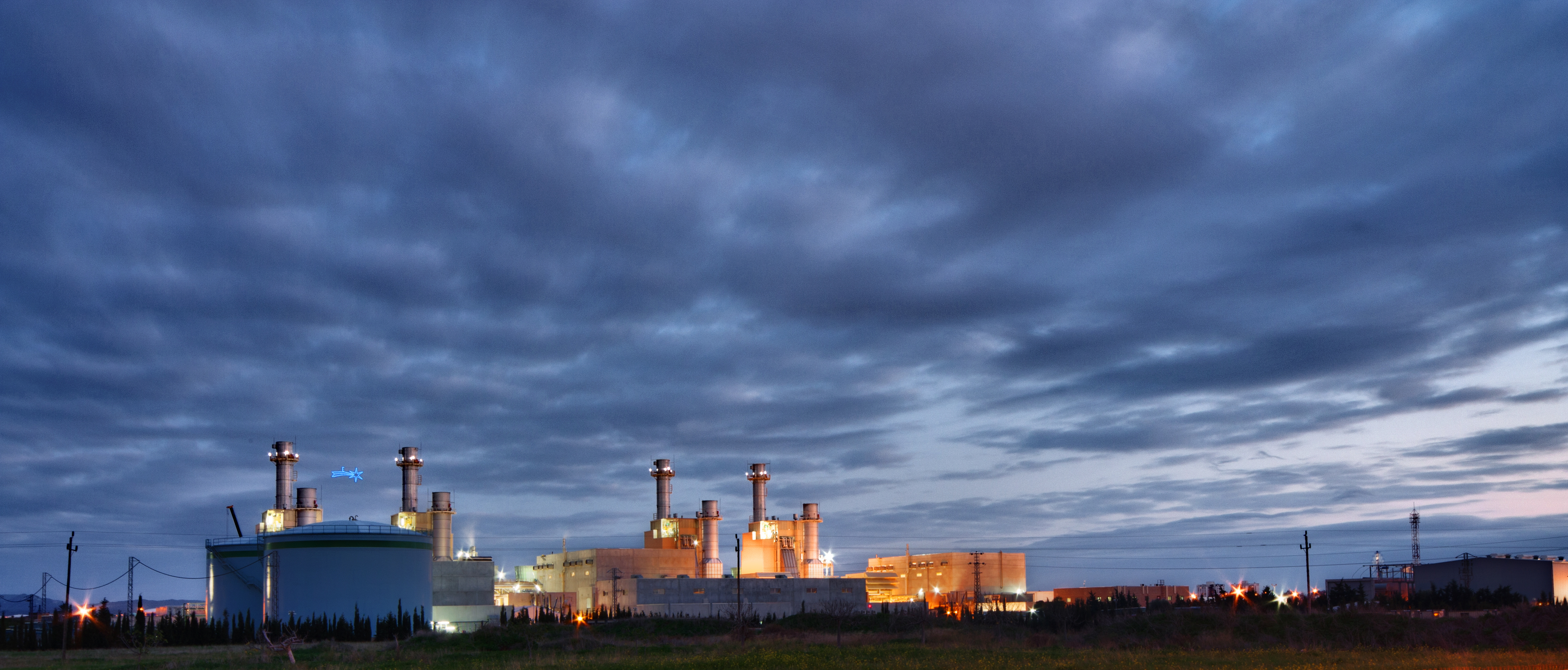 Es que no nos hemos dado cuenta y ya estamos (casi) en Navidad. Pulsa "L" para verla mejor Capture Info Canon 450D Sigma 10-20mm@20mm Apertura: 16 Velocidad: 30seg - 13seg - 2,5 seg ISO: 200 Procesado He creado un HDR a partir de 3 exposiciones de la misma escena. Photoshop Info Se han usado una serie de capas en el procesado por zonas: - Capa de "curvas" para aumentar el contraste de la escena. - Capa de "saturción" general para toda la escena.